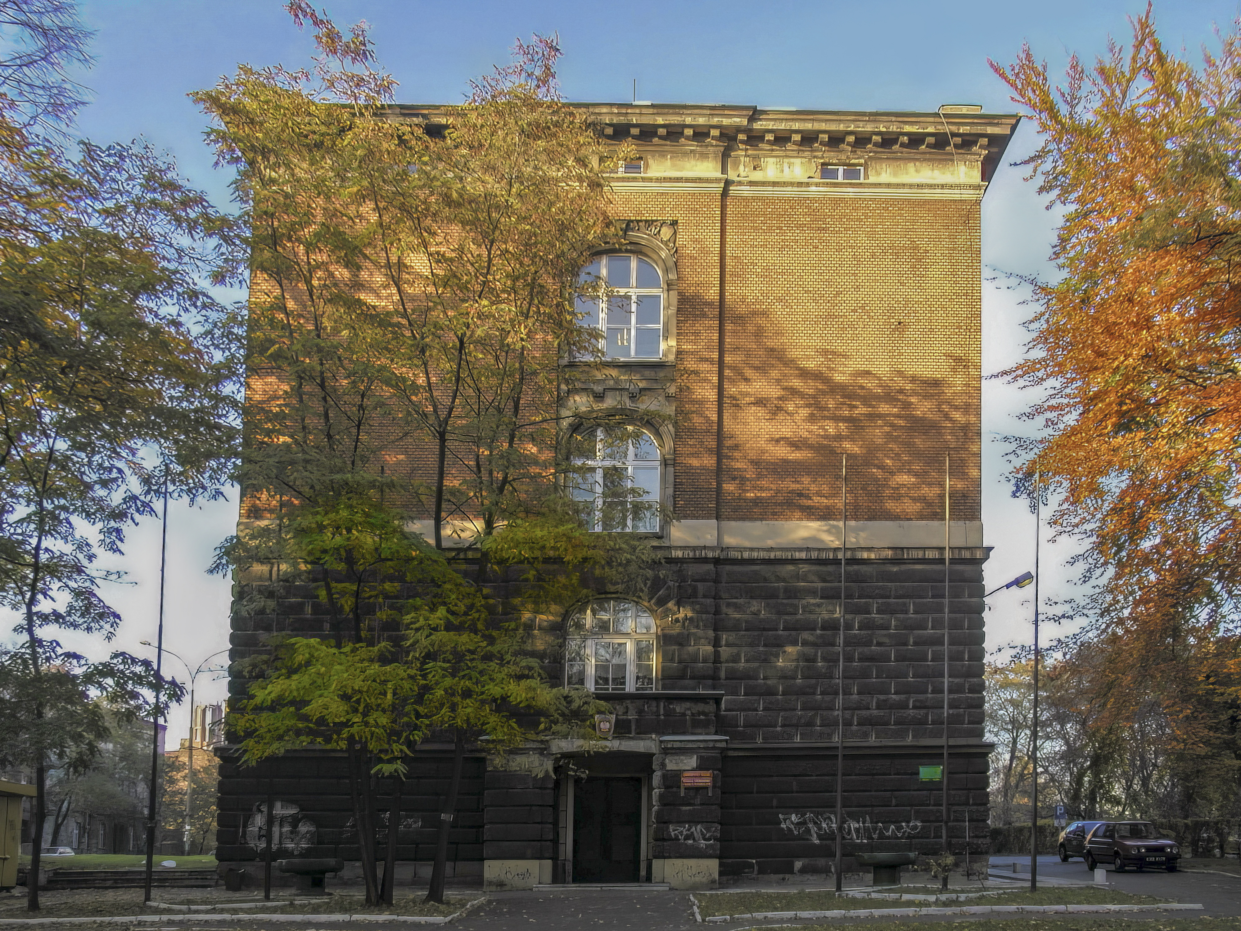 autor: Stimoroll